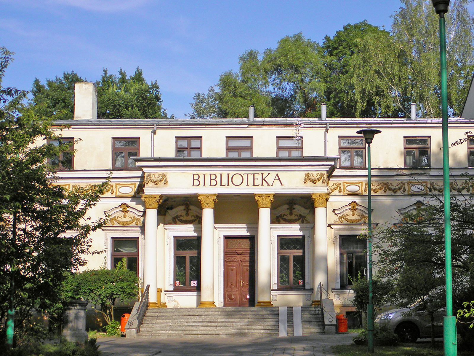 Radom - dawny pałac Kulczyckiego, obecnie Miejska Biblioteka Publiczna.